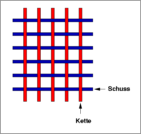 Prinzip der Leinwandbindung